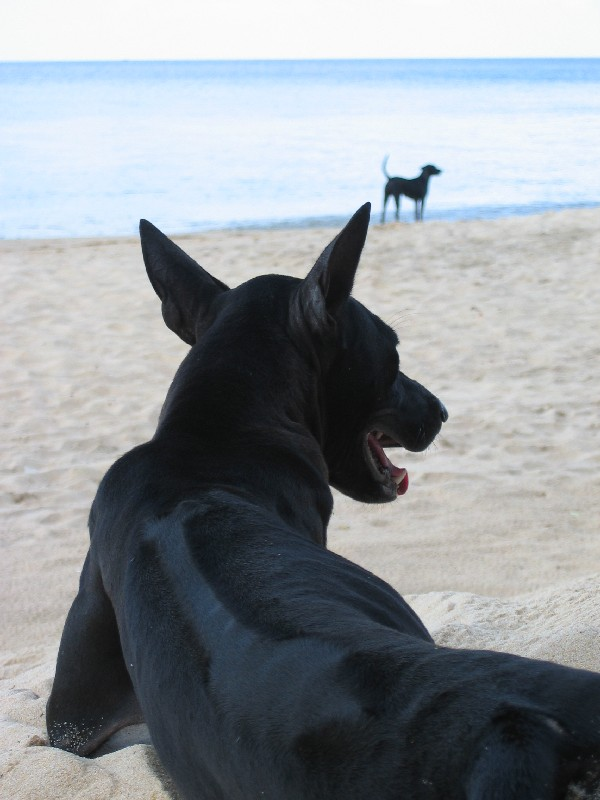 Phu Quoc Dog